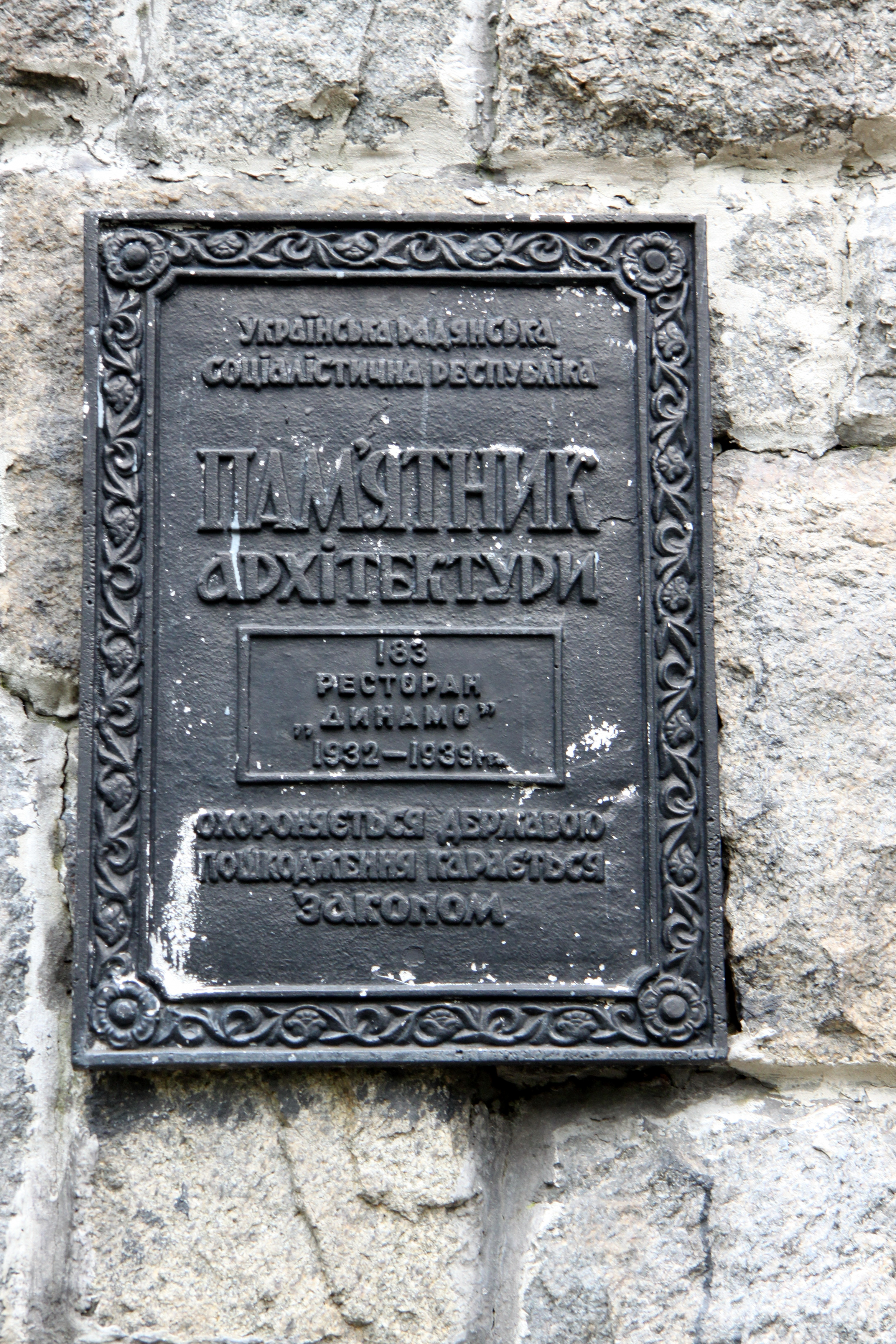 Ресторан «Динамо», Київ, Грушевського Михайла вул., 3